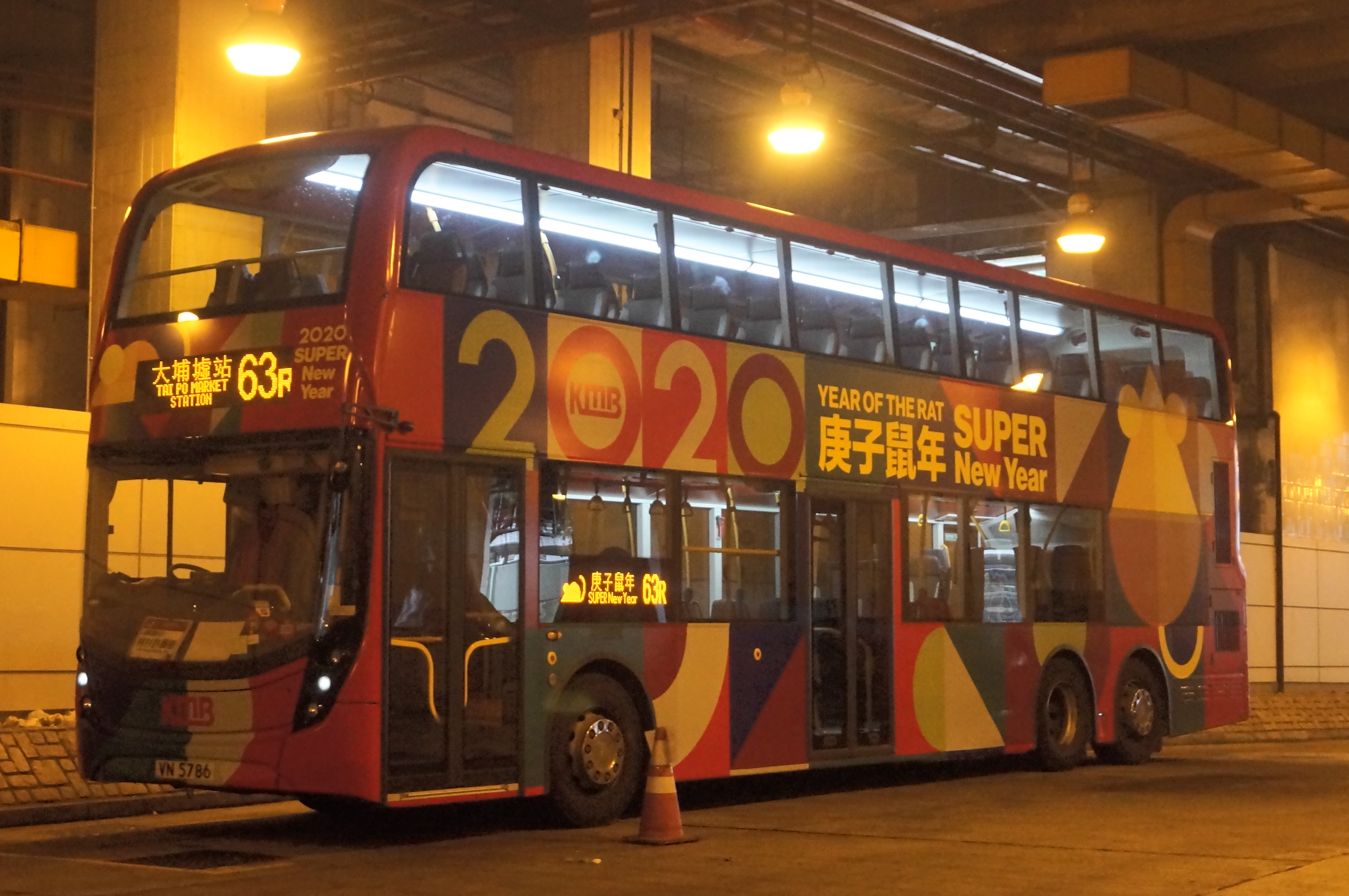 中文（香港）: VN5786@63R